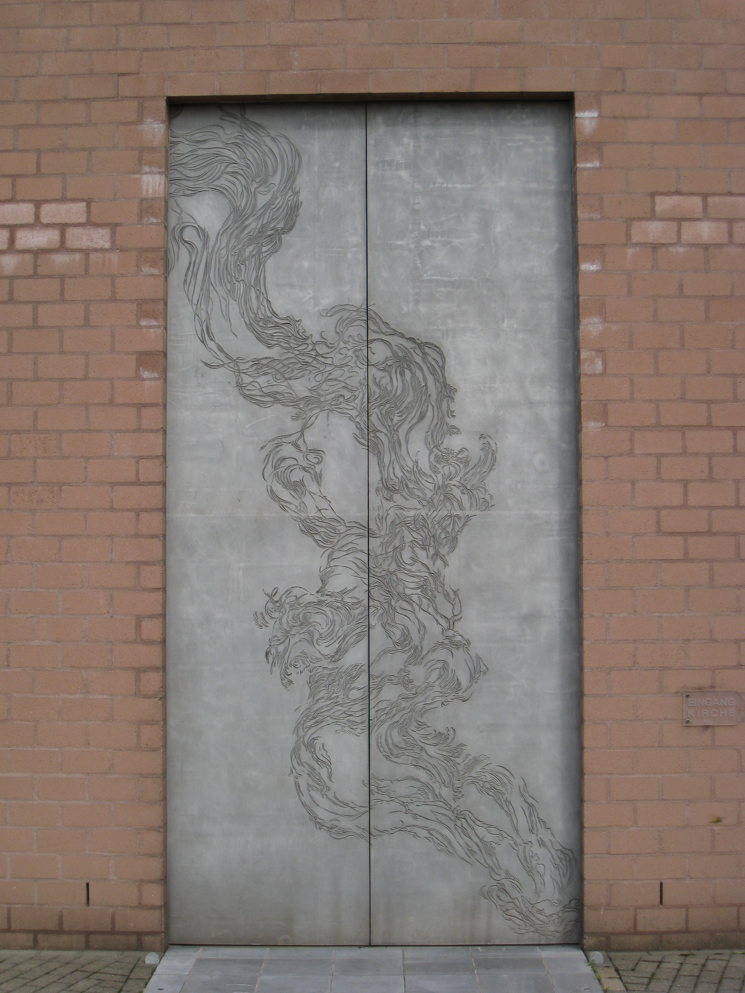 Kirchentür (Westseite) St. Clemens und St. Pankratius Inden Altdorf